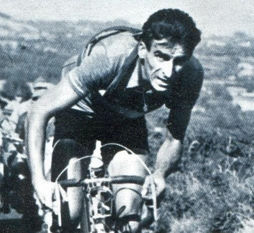 Raphael Geminiani, 'Sprint 73', Panini figurina n°155.